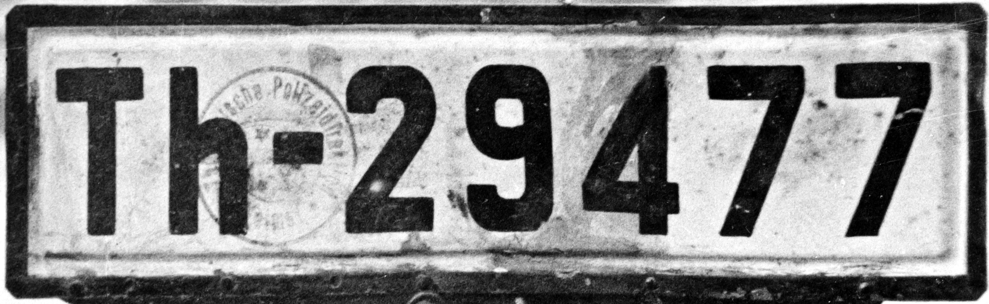 Fotosammlung Wilhelm Walther, Bildnummer 6782